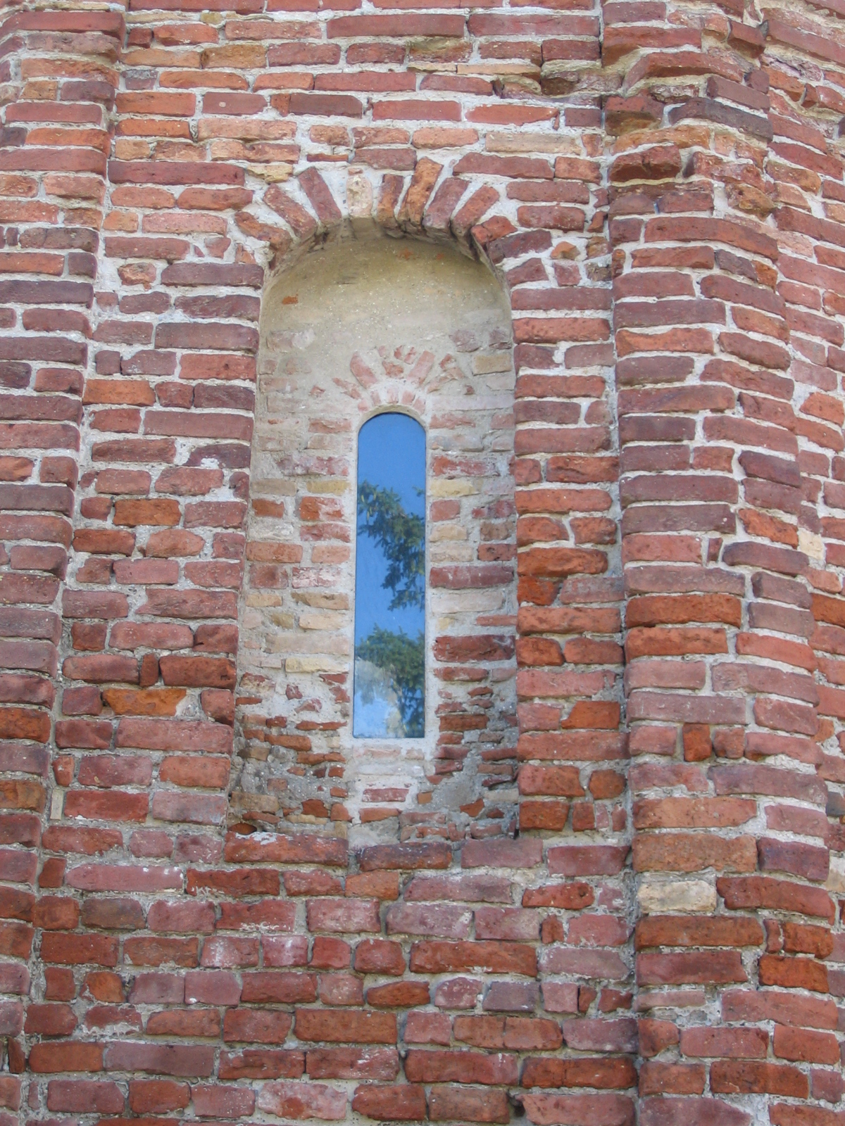 Basilica Autarena di Fara Gera d'Adda, nel comune di Fara Gera d'Adda.